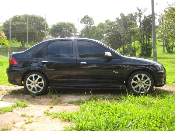 Foto lateral del Chevrolet Prisma